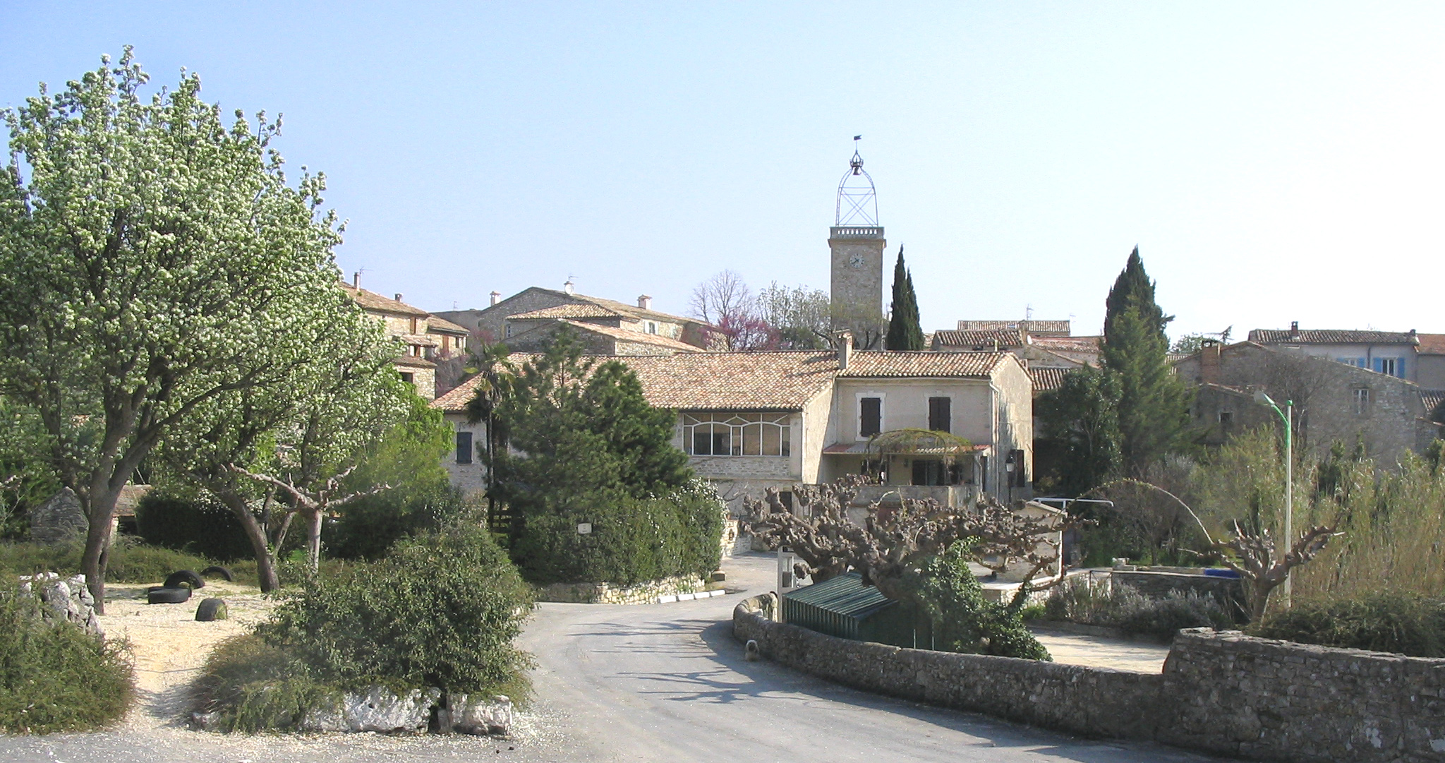 Village de Deaux vue de la place de la mairie